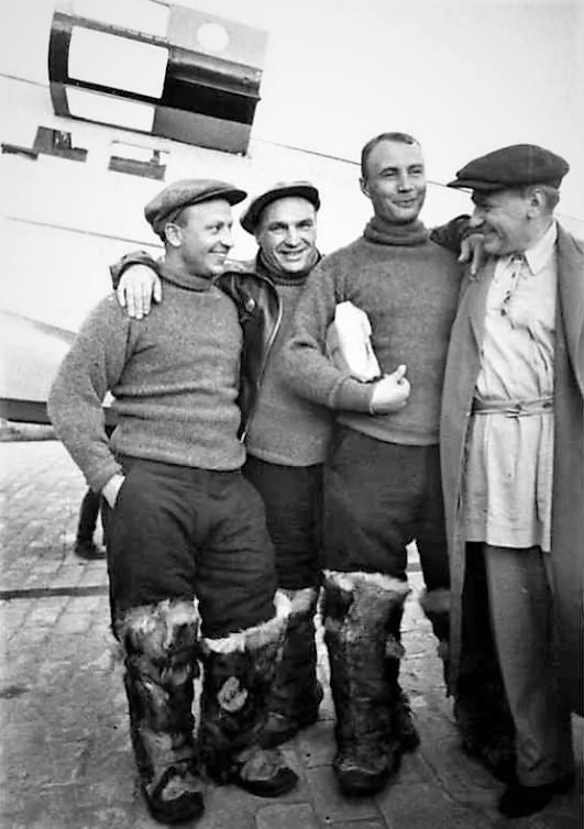 Перед вылетом на Дальний Восток. Аэродром Щёлково. Слева направо: члены экипажа АНТ-25 Г.Ф. Байдуков, В.П. Чкалов, А.В. Беляков и конструктор самолёта А.Н. Туполев